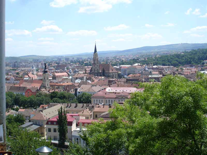 View, Cluj, RomaniaCluj du haut-194